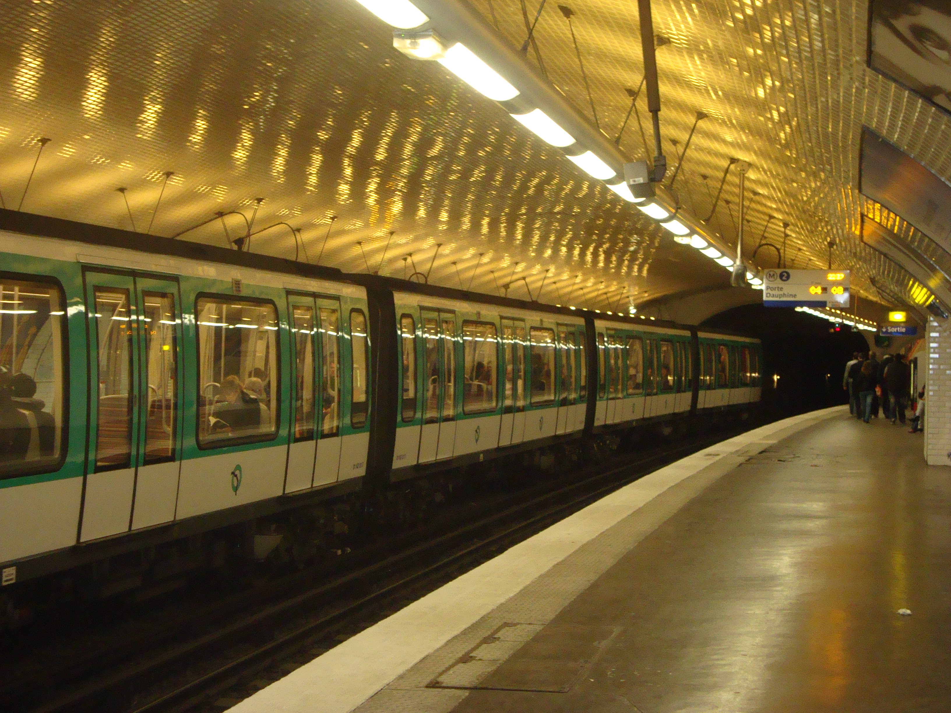 Rame direction Nation à l'arrêt station Ménilmontant.